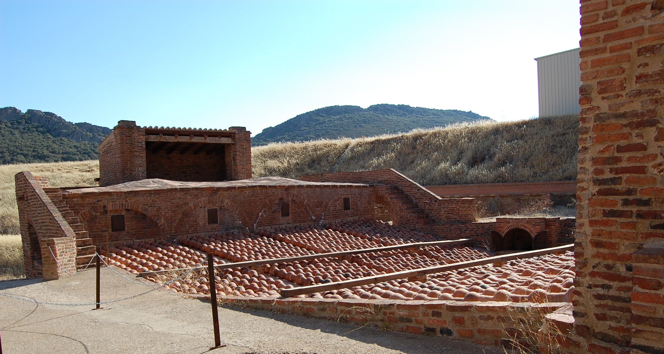 Horno de Bustamante en las Minas de Almadén (provincia de Ciudad Real - España).